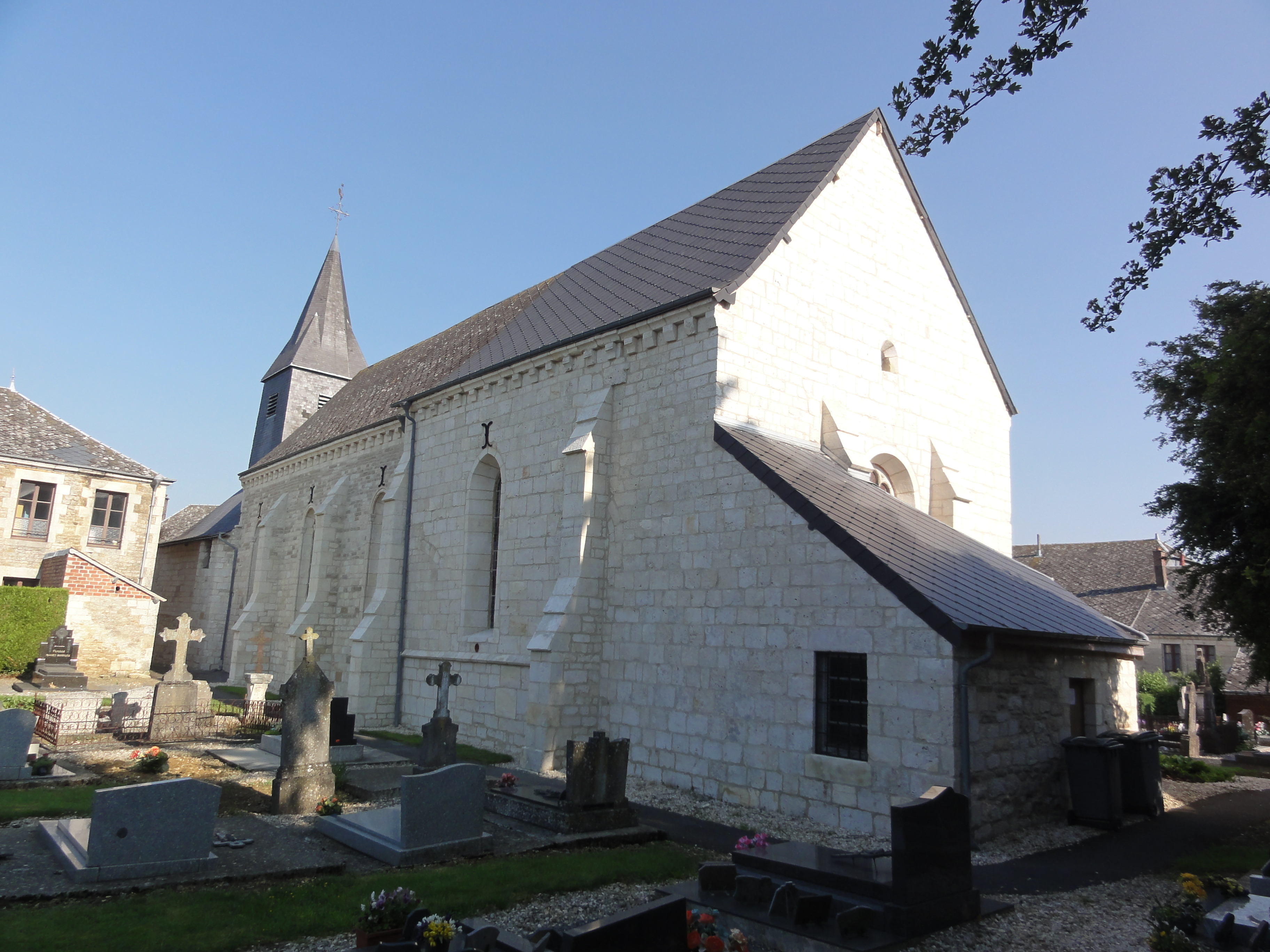 Estrebay (Ardennes) Église chevet